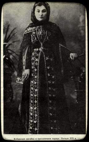 Кубанская ногайка